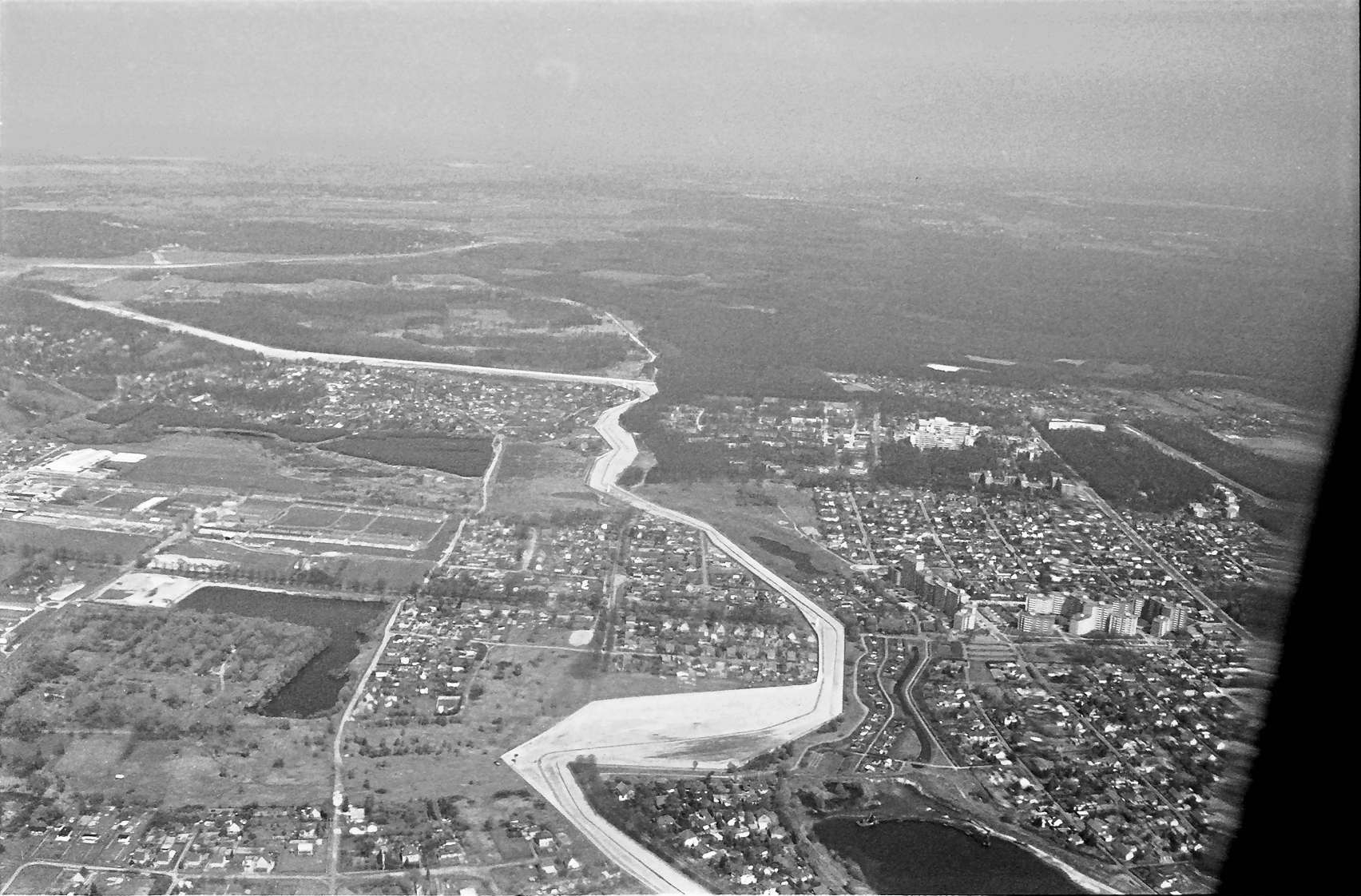 Berliner Mauer zwischen Falkensee (links) in Brandenburg und dem Falkenhagener Feld (rechts) im West-Berliner Bezirk Spandau. In der unteren Bildhälfte von links nach rechts: die durch den Mauerstreifen unterbrochene Spandauer Straße/Falkenseer Chaussee.